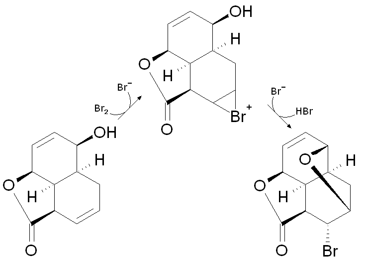 Dritter Schritt der Reserpin-Totalsynthese nach Woodward: Bromierung Nummero Uno (ausführlich).